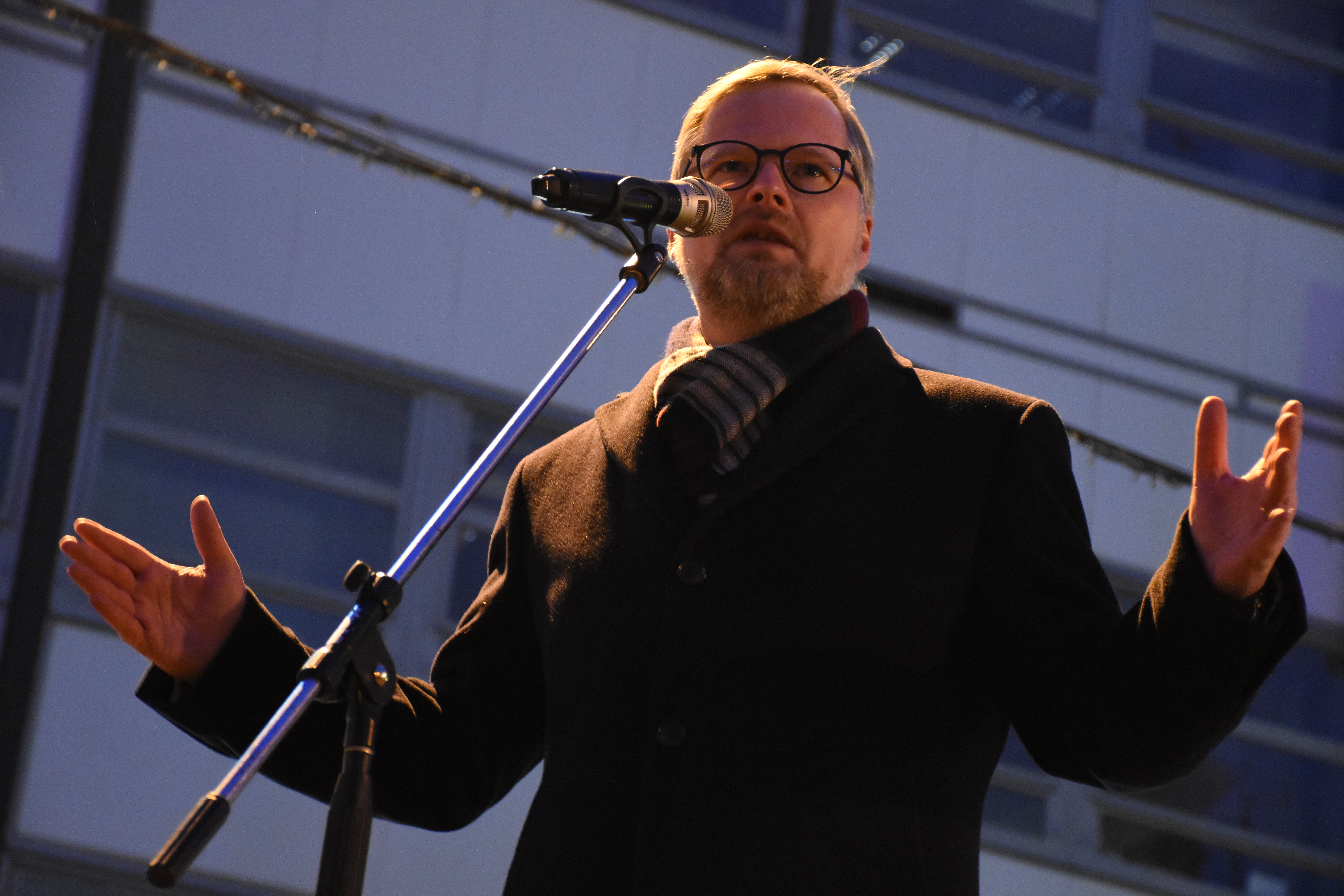 hovoří Petr Fiala